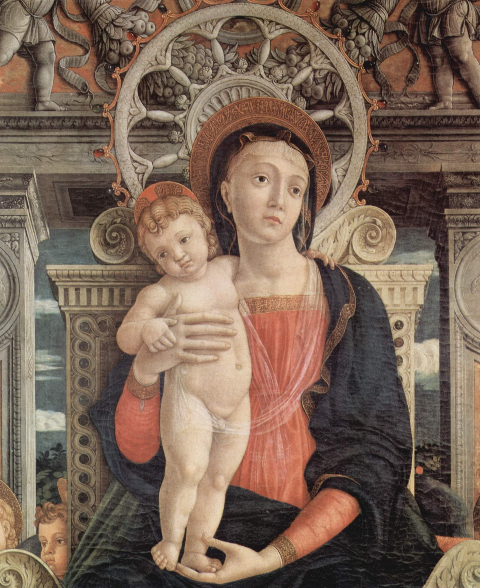 detail